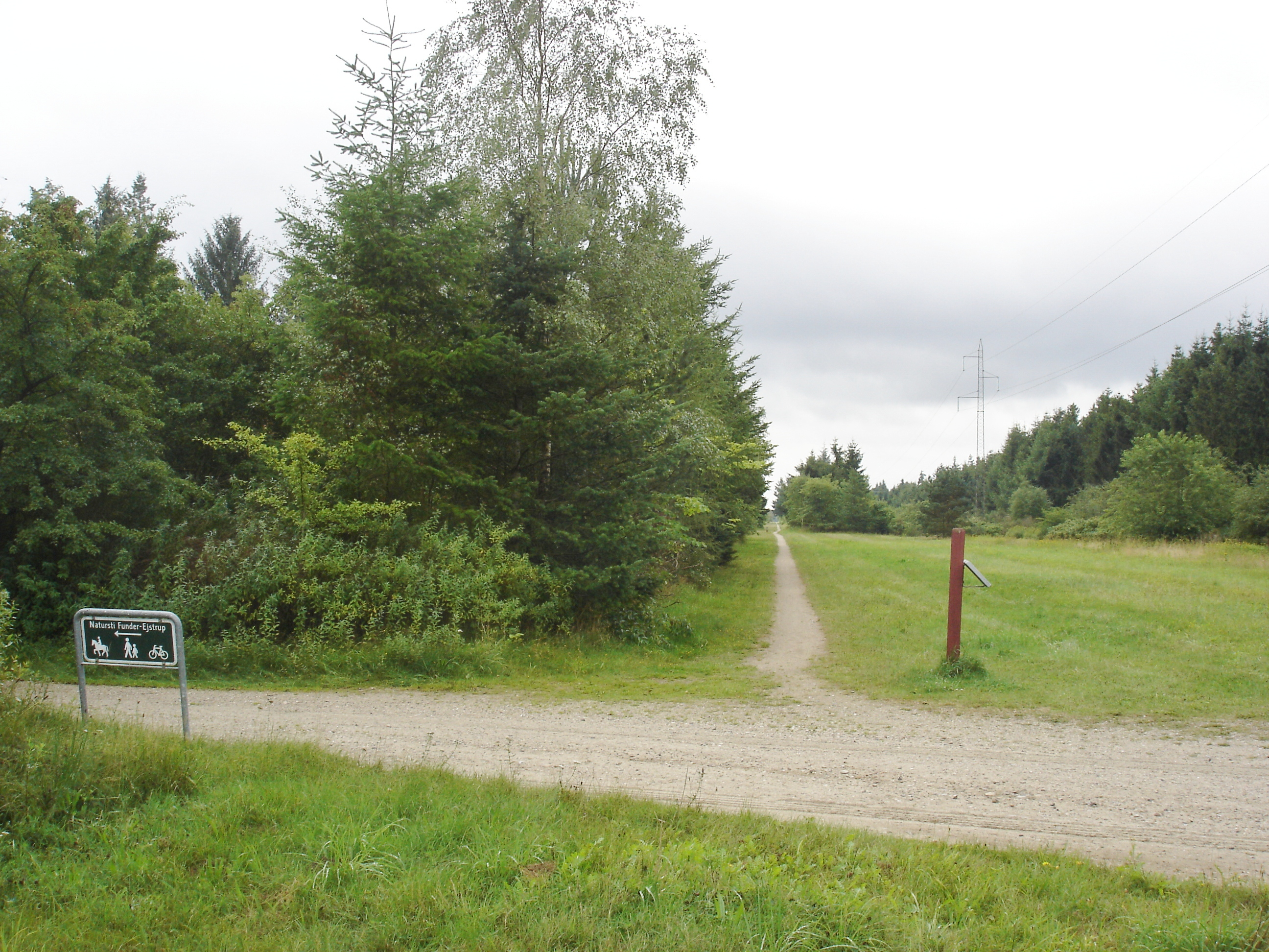 Funder-Ejstrup Natursti kommer tilbage på Diagonalbanens tracé ved Hjøllund Station